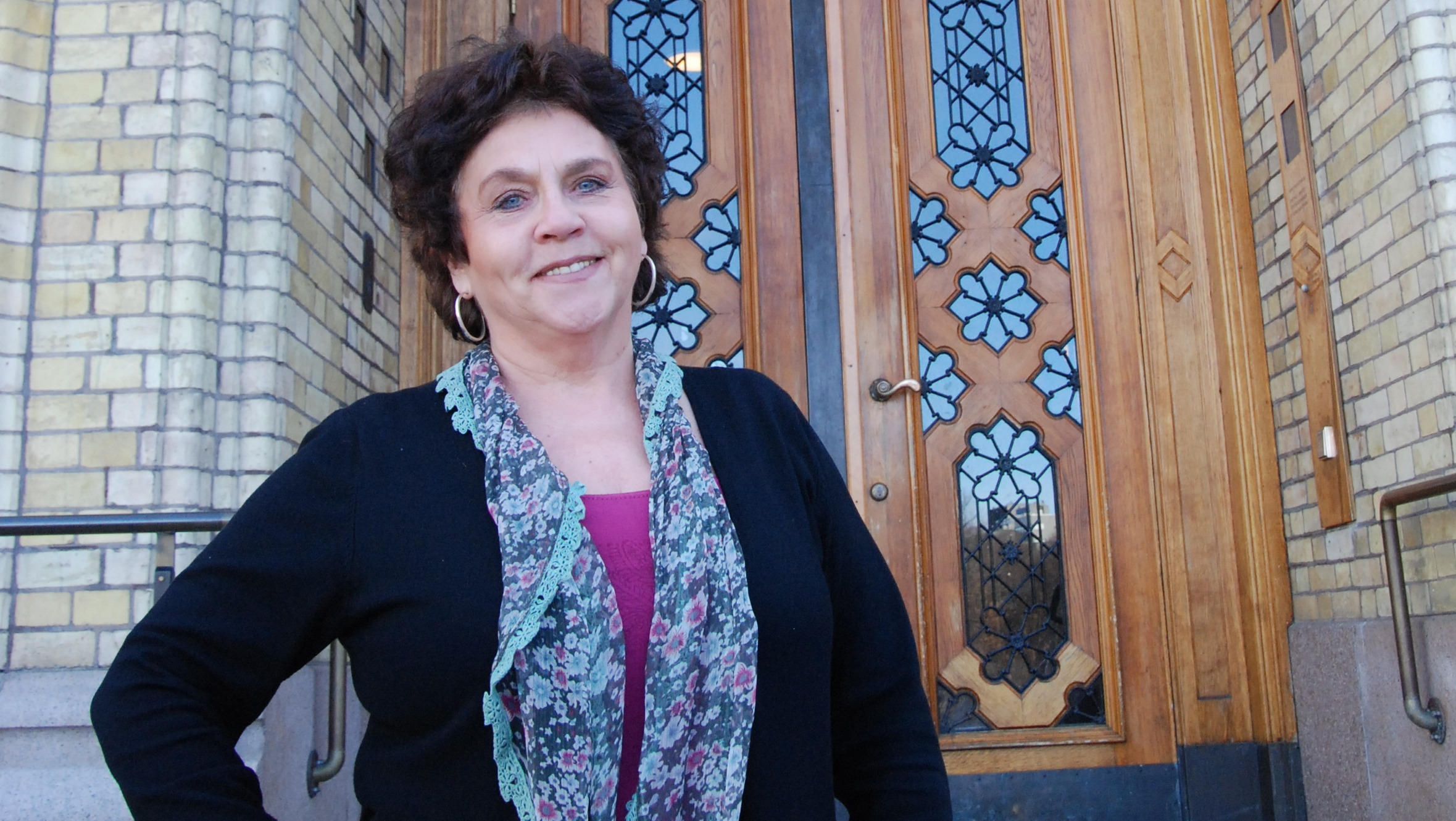 Tove Karoline Knutsen